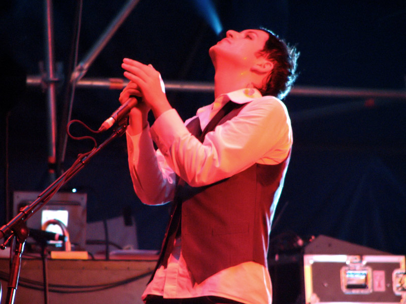 Brian Molko from Placebo, placebo @ colonia sonora, 27/06/06, collegno (italy)